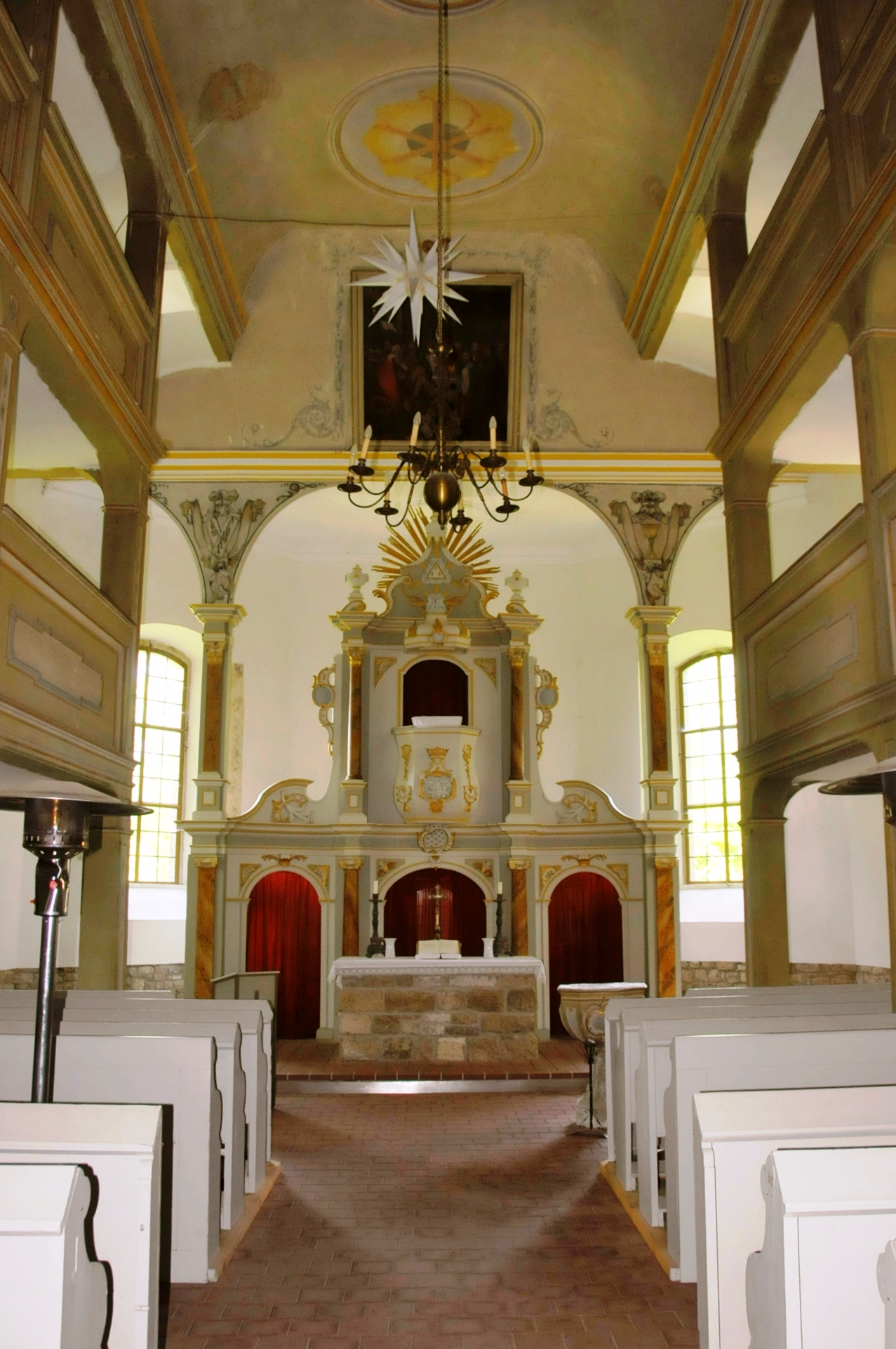 Zottelstedt, Kirche, Inneres